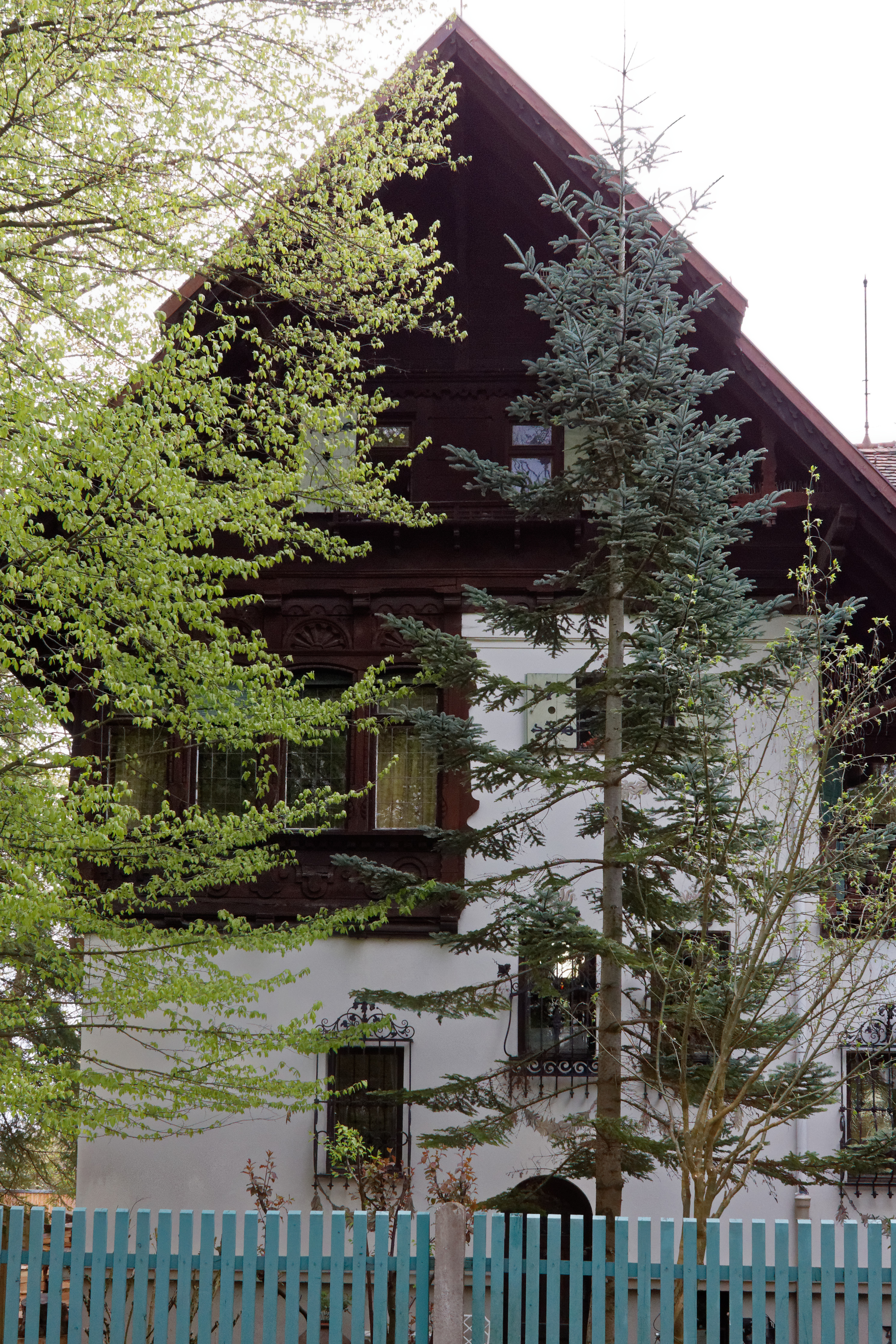 Villa Scheibe in der Heilmannstraße 33 in München